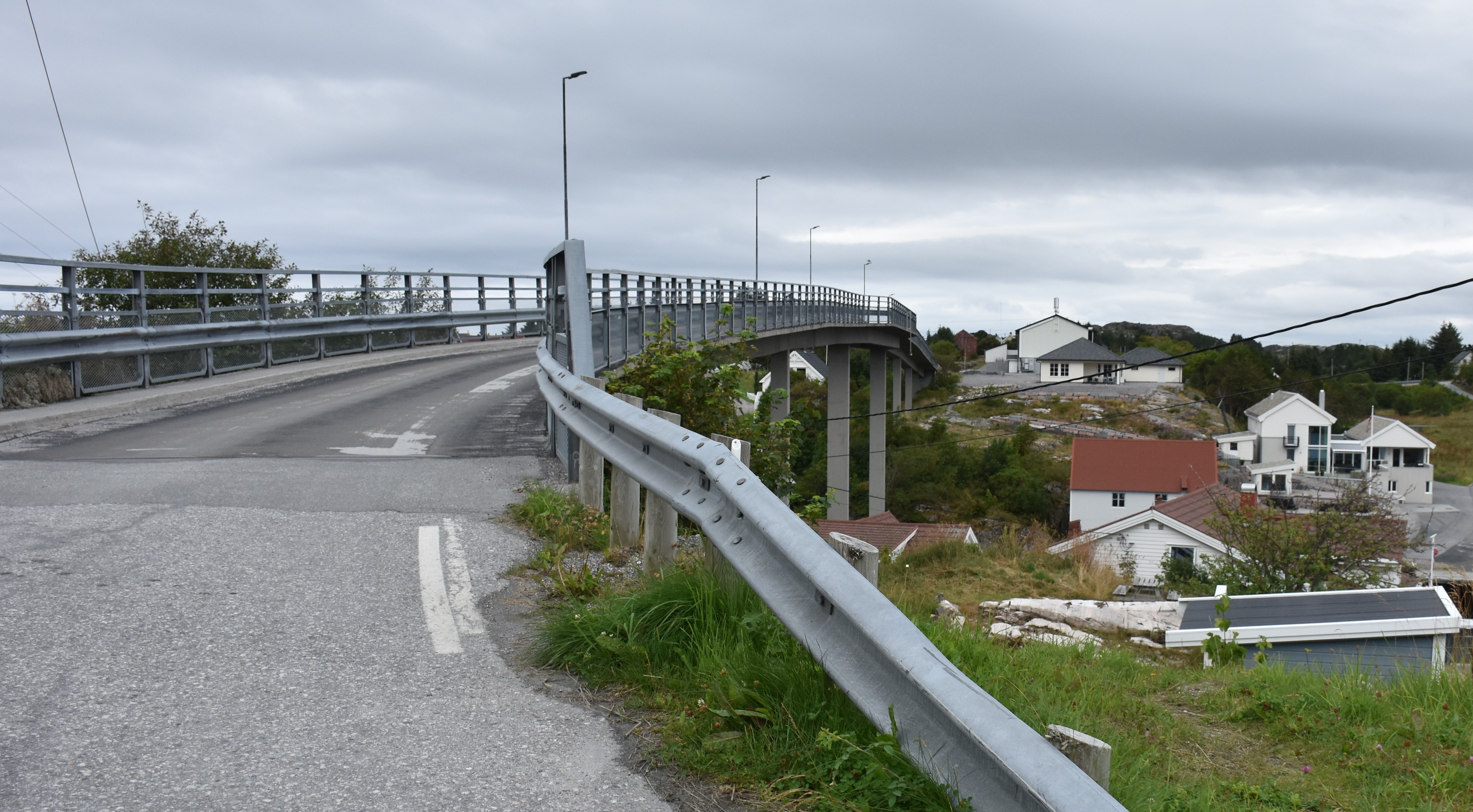 Sveggebrua fører Sveggeveien (fylkesvei 258) over Sveggesundet ved Sveggen